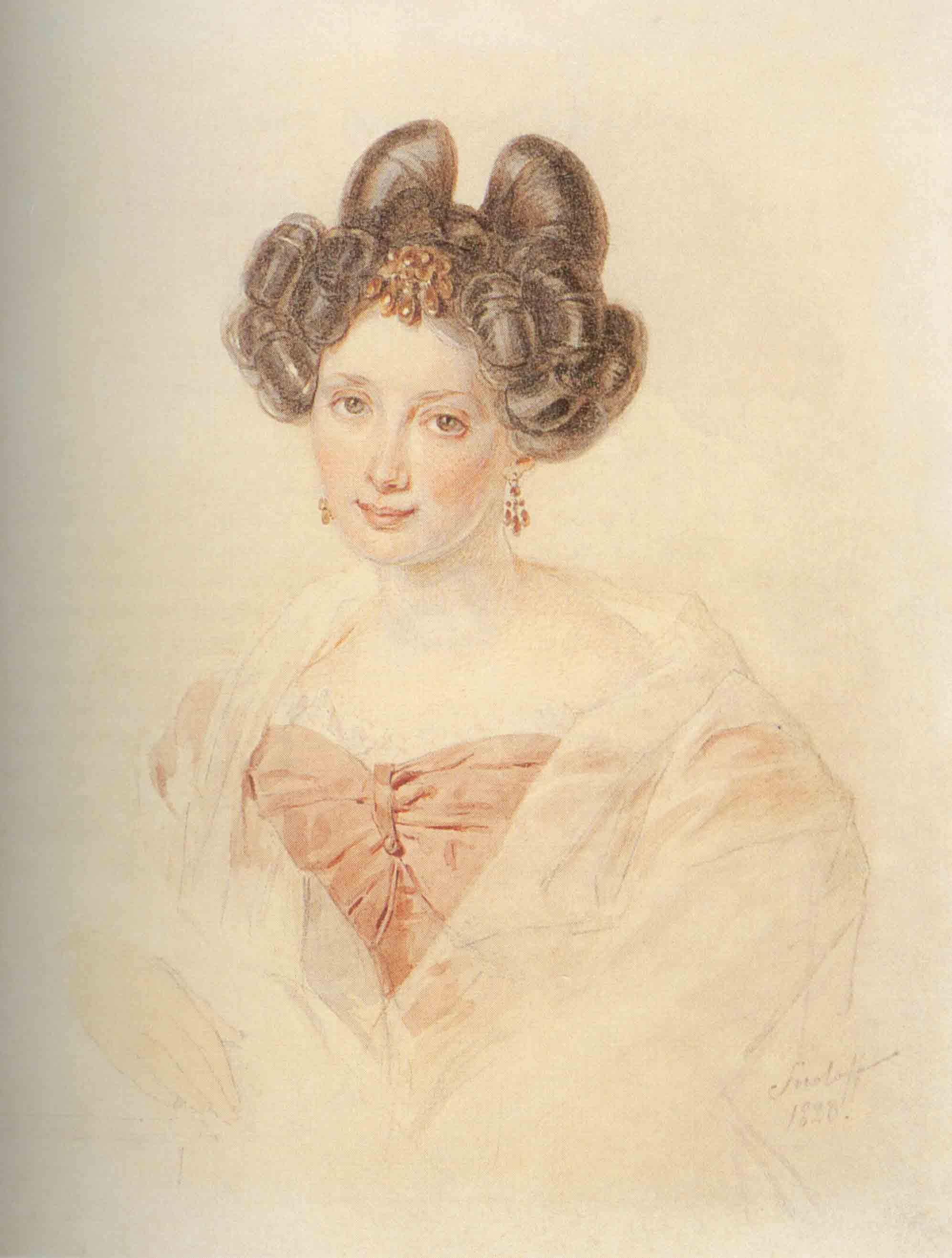 Бакунина Екатерина Павловна (1795-1869)